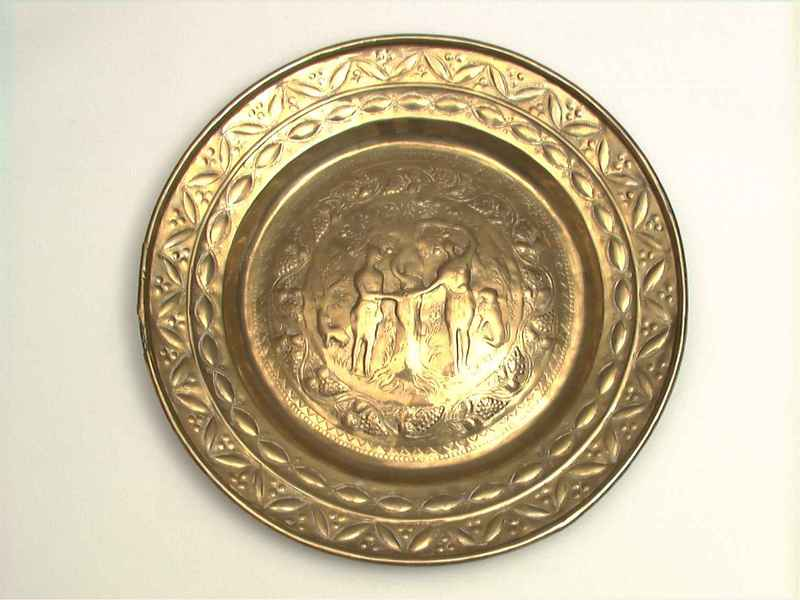 Døpefat. Syndefallet var et vanlig motiv på døpefat. Adam og Eva står ved Kunnskapens tre og spiser av eplet som fører til utdrivelsen fra paradis. Slangen, som villedet dem, slynger seg rundt treet. Langs kanten er det en bord med drueklaser. Druer kan være et symbol på gjenoppstandelse og har dermed den motsatte betydningen av eplet. Brukssted: Akershus, Fet. Motiv: Syndefallet. Adam og Eva flankerer Kunnskapens tre. Slangen snor seg rundt trestamme. En bord med drueranker står i en ring rundt hovedmotivet. Mål:Diameter: 47.5 cm Høyde: 5 cm Materiale:Metall, messing Teknikk:Drevet,punslet. Dekorteknikk:Drevet,punslet,motiv